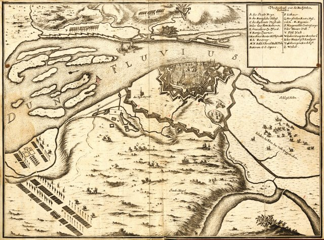 Scan from Johann Christoph Brotze's book Sammlung verschiedner Liefländischer Monumente. Anmerkungen zum gegenüberstehenden Kupfer. Dieses Kupfer stellt die Bloquade der Stadt Riga durch die Polnischen Sächsischen Truppen Anno 1700 vor ... [die Gravüre].